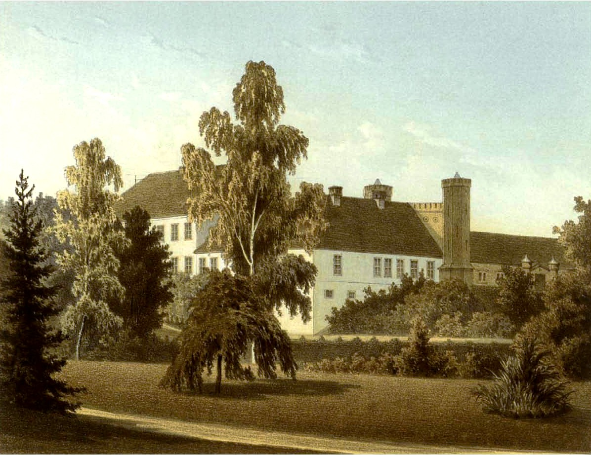 Schloss Gallingen, Kreis Friedland, Ostpreußen